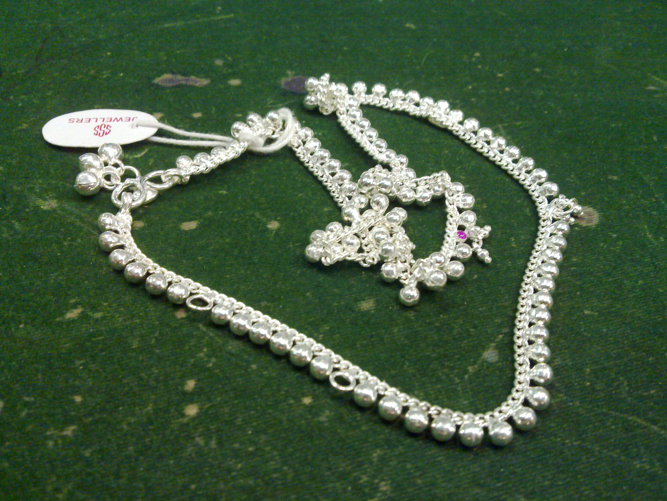 வெள்ளி அரைஞாண்- பெண்குழந்தைகளுக்கு அணிவிக்கப்படுவது.